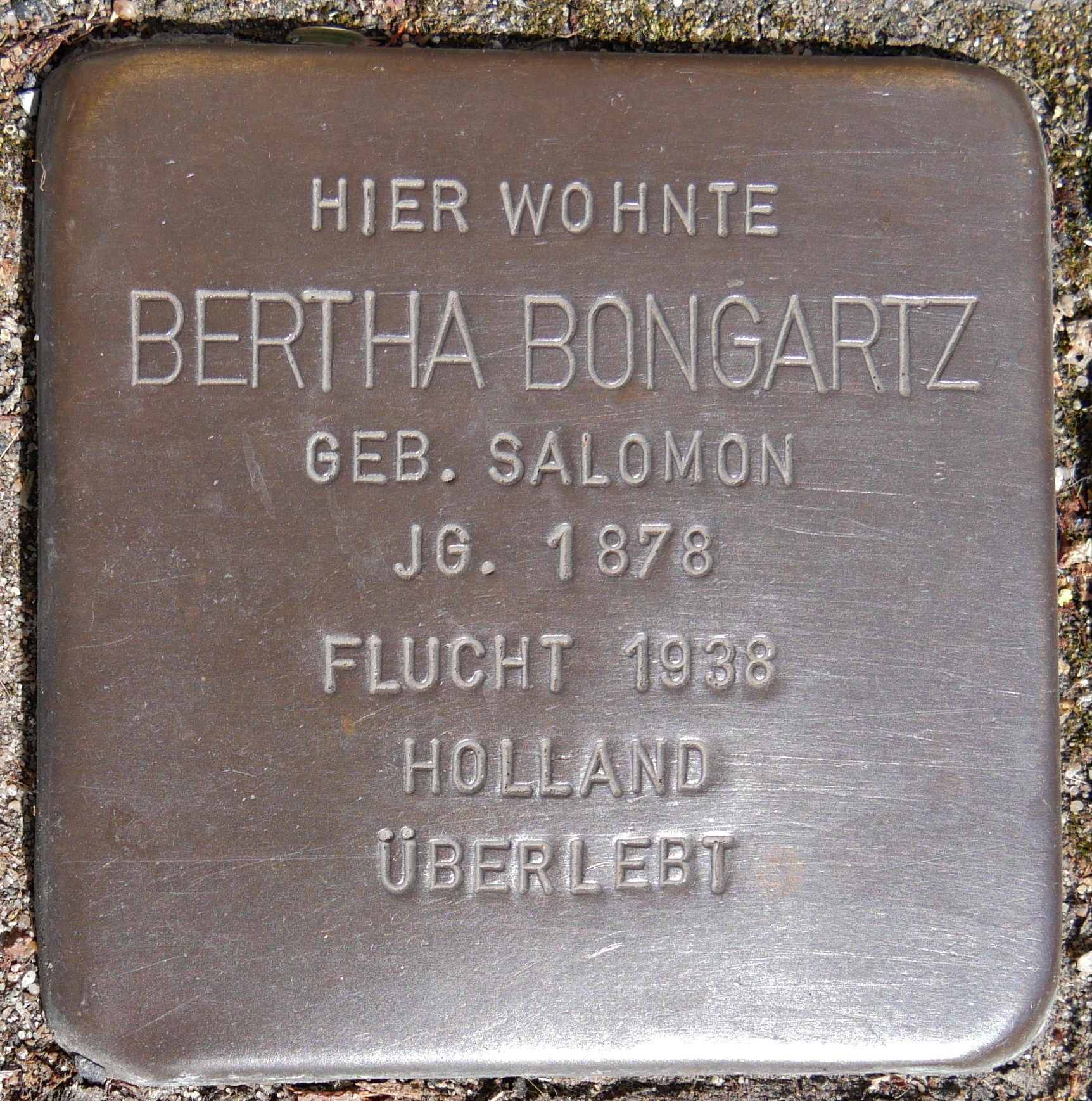 Stolpersteine Wesel: Bongartz, Bertha